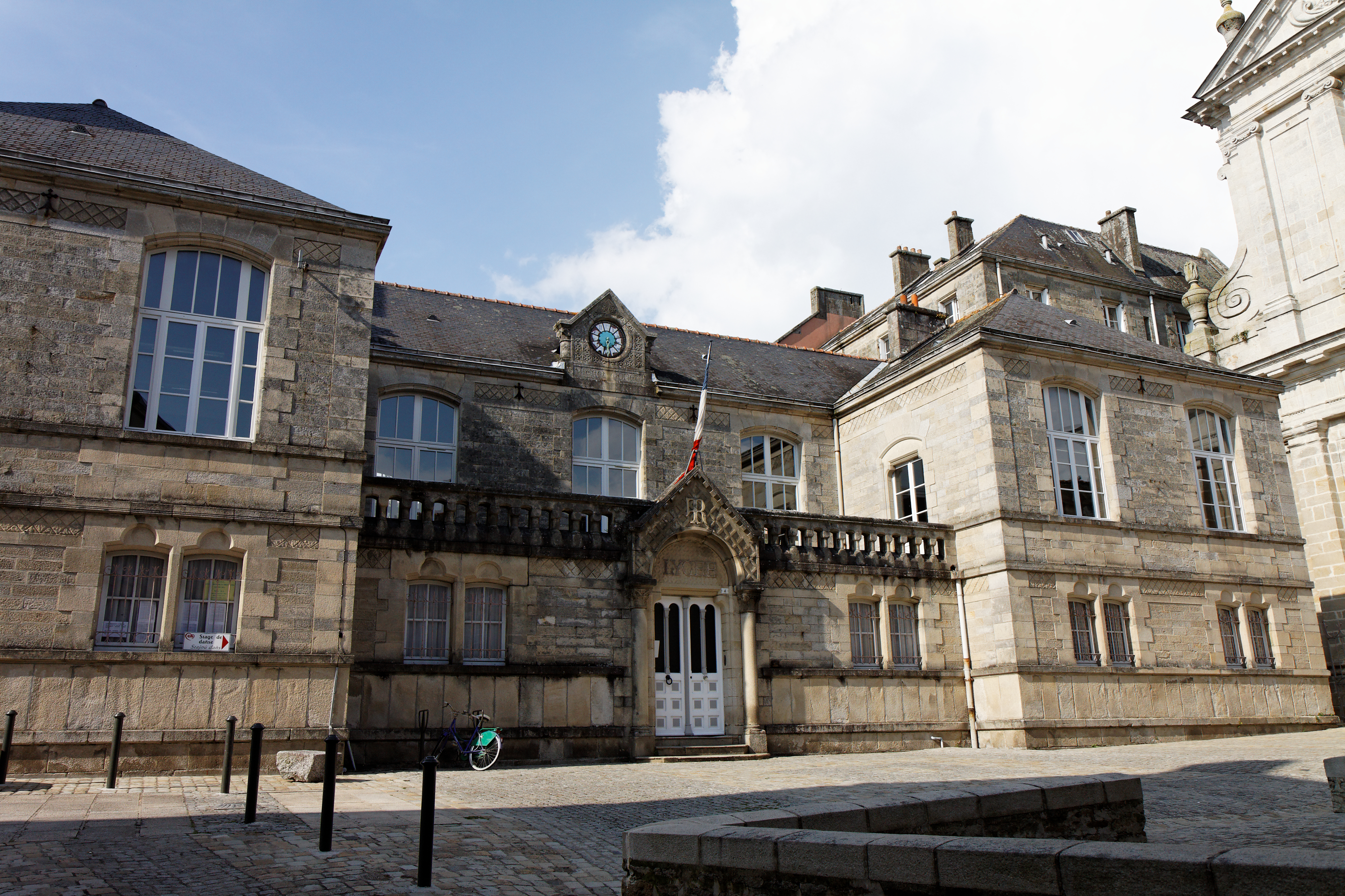 Le lycée la tour d'Auvergne à Quimper. .